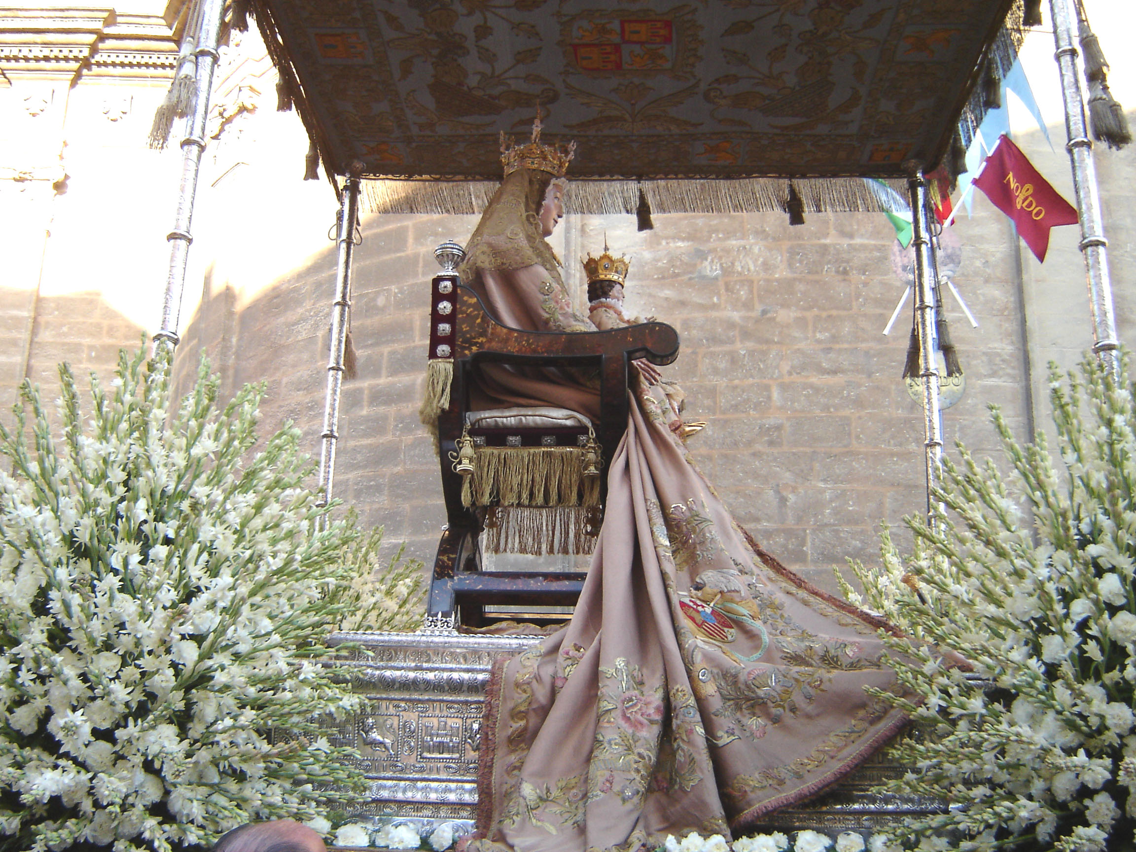 Procesión Virgen de los Reyes en Sevilla. Imagen de la Virgen de los Reyes vista desde un lateral.